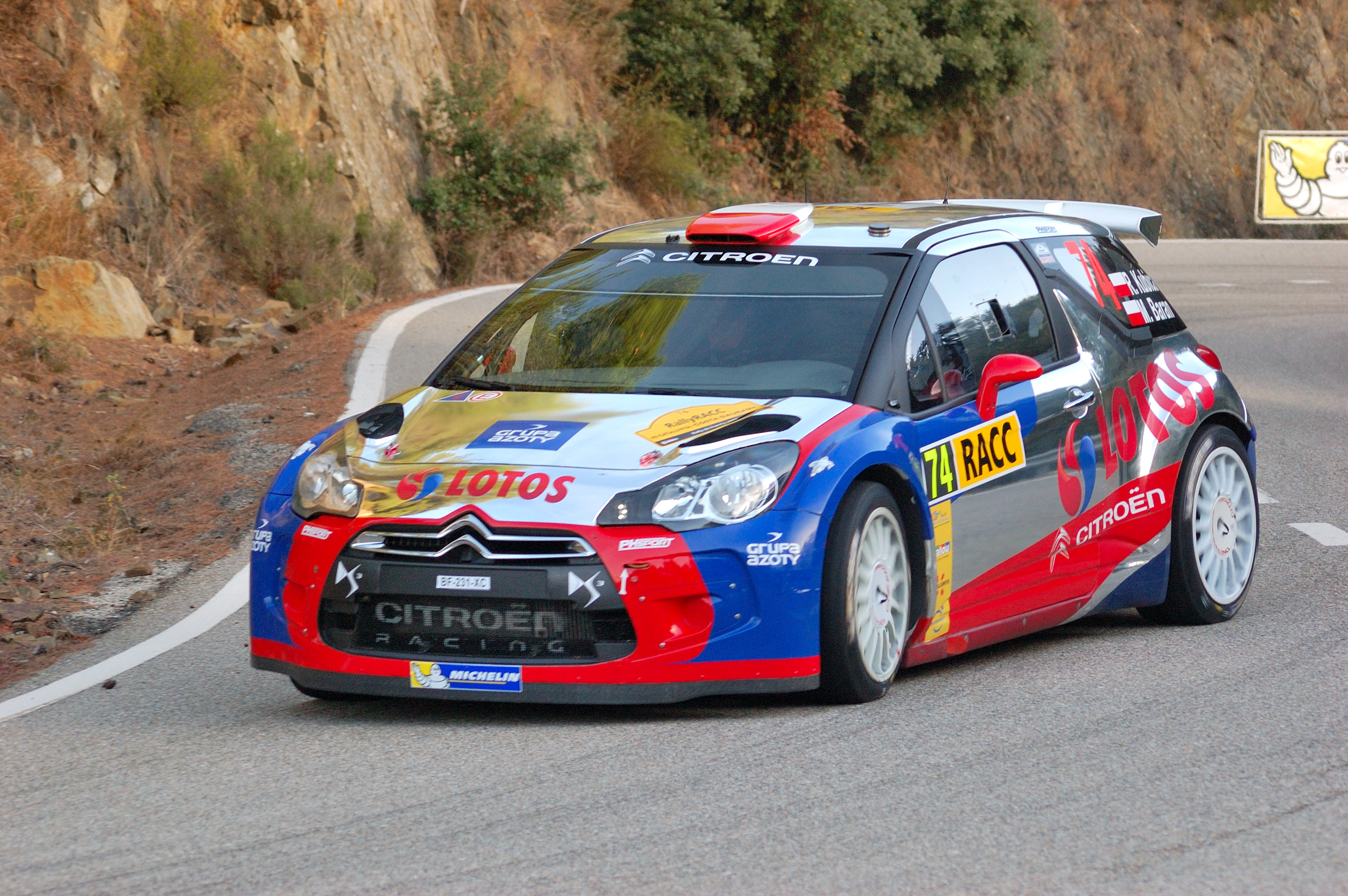 Robert Kubica/M.Baran SS4 Riudecanyes - Rally Catalunya 2013